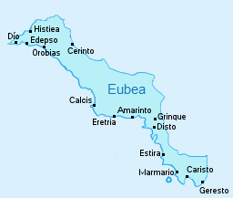 Mapa de Eubea con la ubicación de algunas de sus principales ciudades en la Antigüedad.